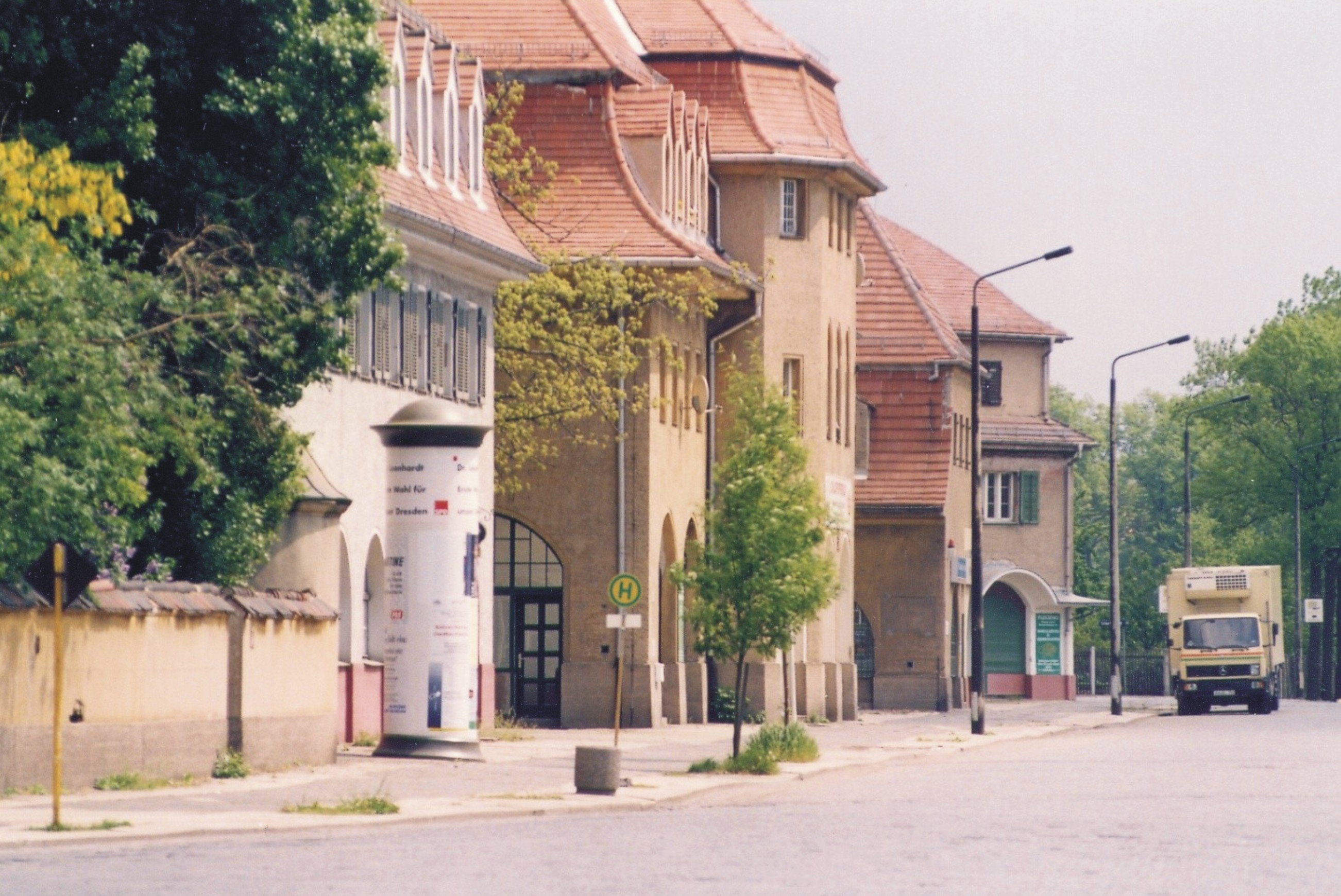 Dresdner Schlachthof im Ostragehege, Wohnhäuser am Schlachthofring